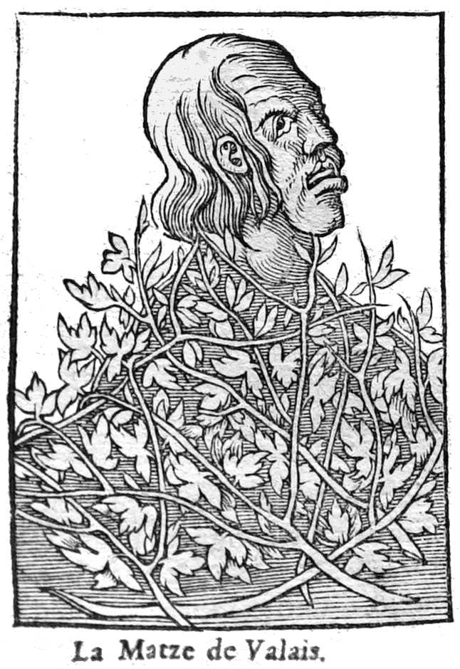 tiré de la "Cosmographie universelle "de Belleforest.